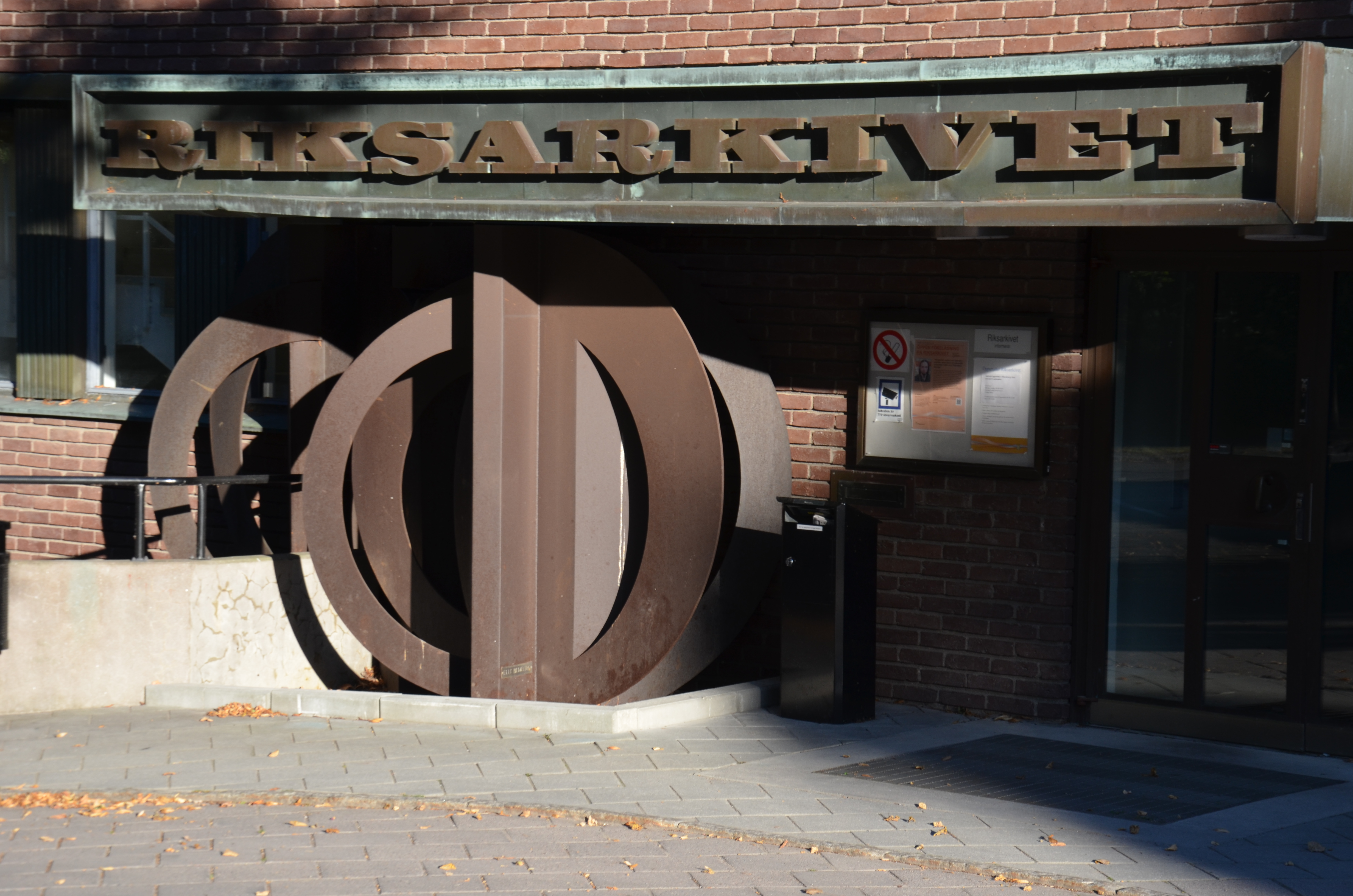 Virvelvind av Elli Hemberg, metall, utanför Riksarkivets entré på Kungsholmen i Stockholm, 1970